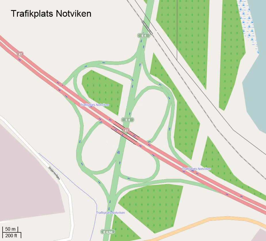 Trafikplats Notviken, Norrbotten, Sverige.